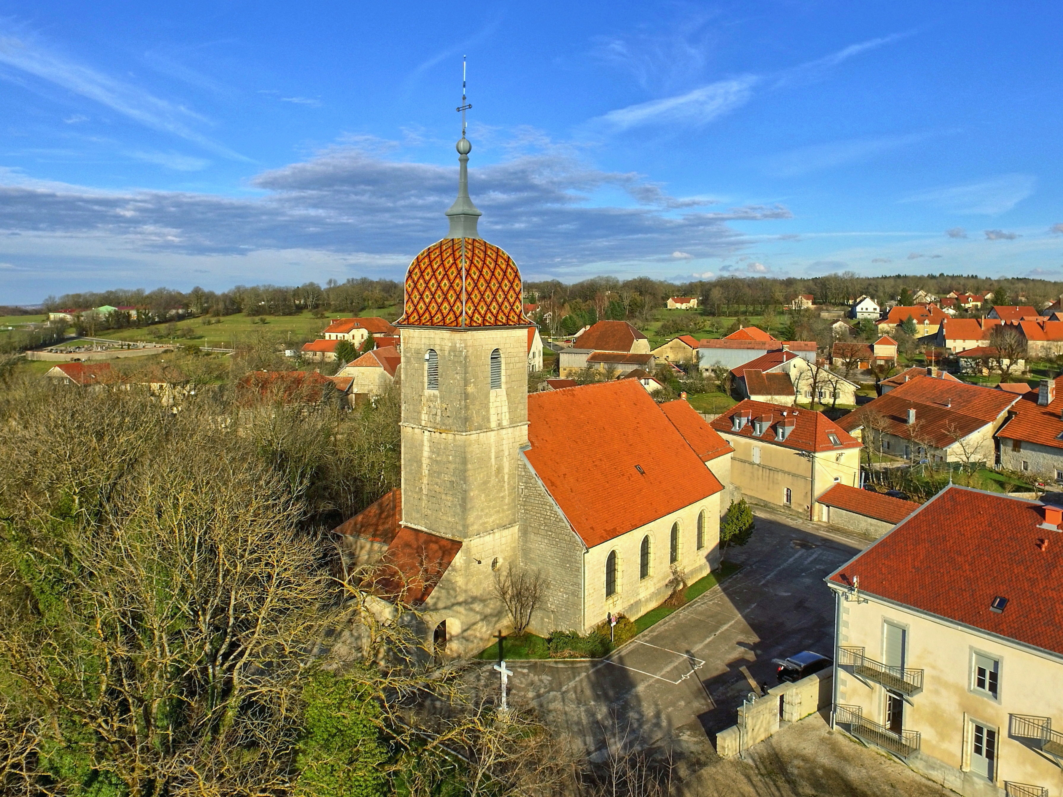 L'église paroissiale de l'Assomption .